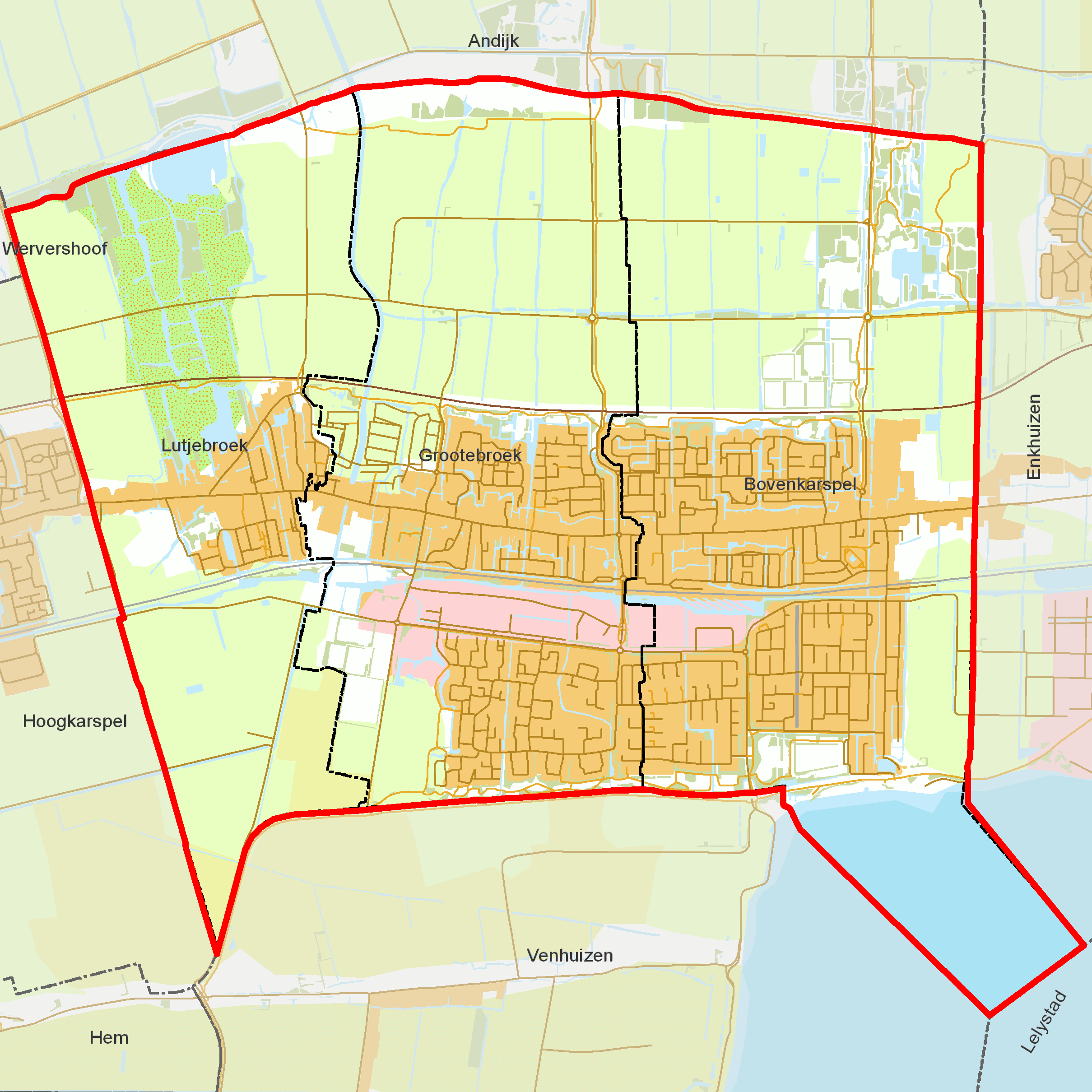 BAG woonplaatsen - Gemeente Stede Broec.png